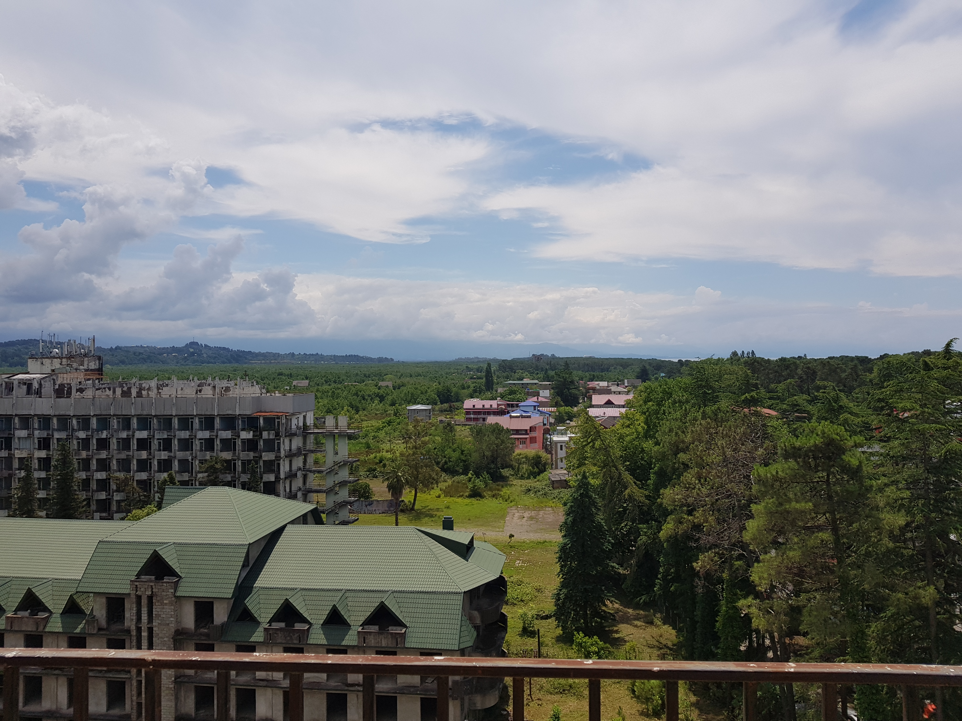 მთის ბროლი